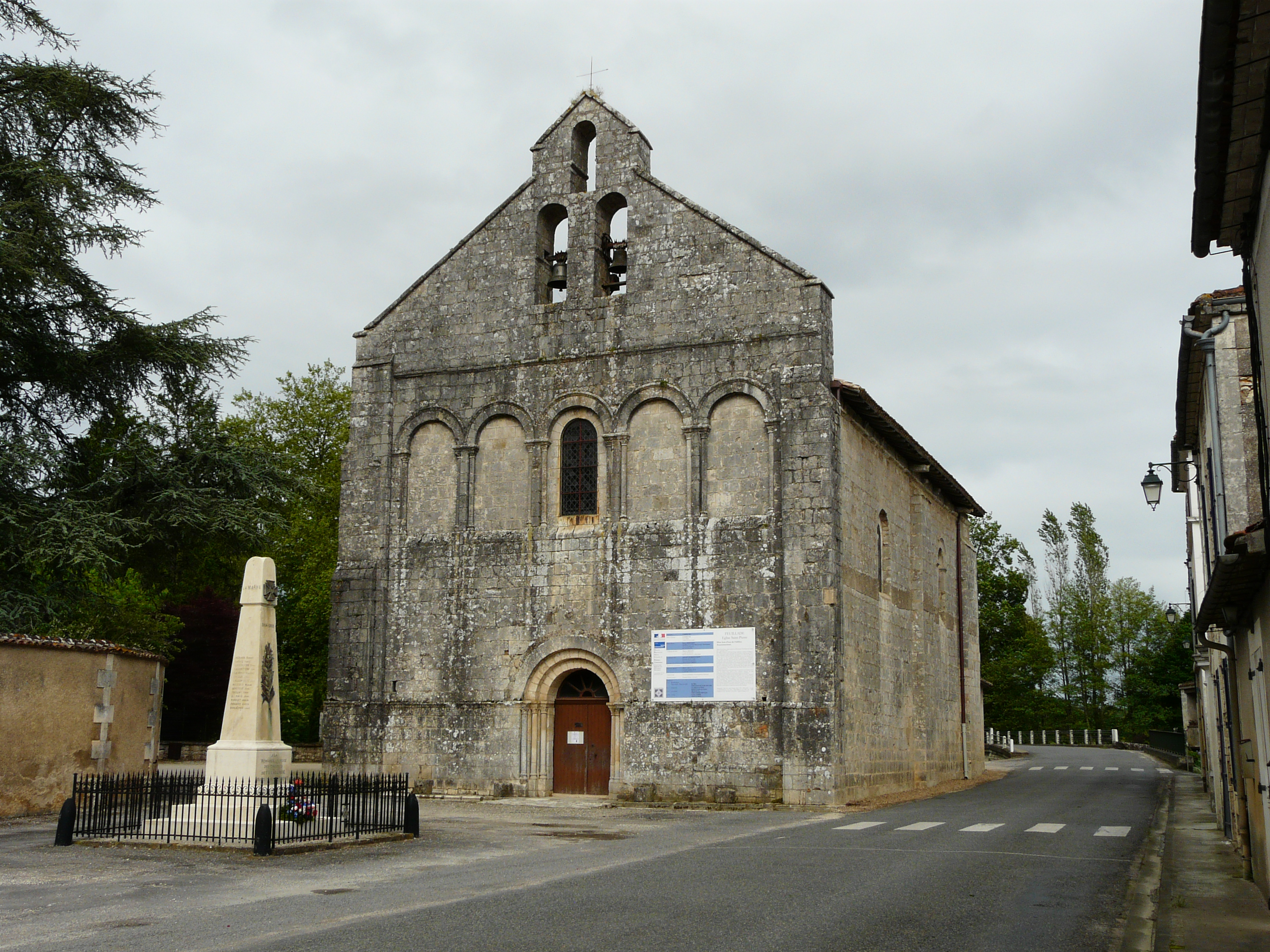 Le monument aux morts et l'église Saint-Pierre, Feuillade, Charente, France Object location45° 36′ 26″ N, 0° 28′ 18″ E